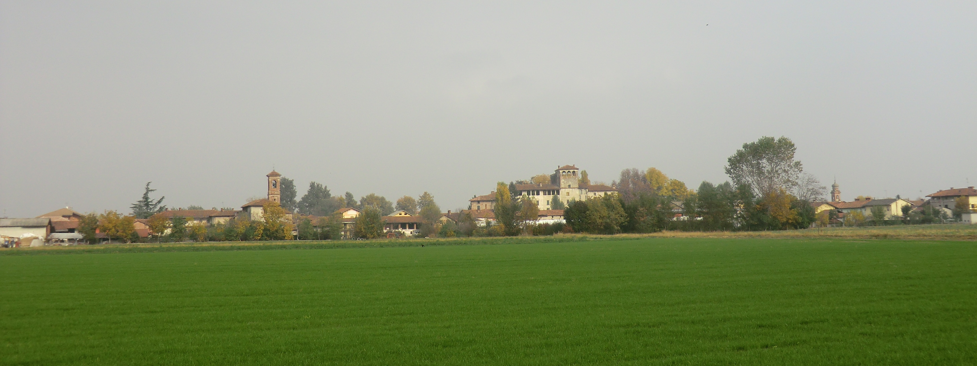 Ruffia (Cuneo - Italia): panorama